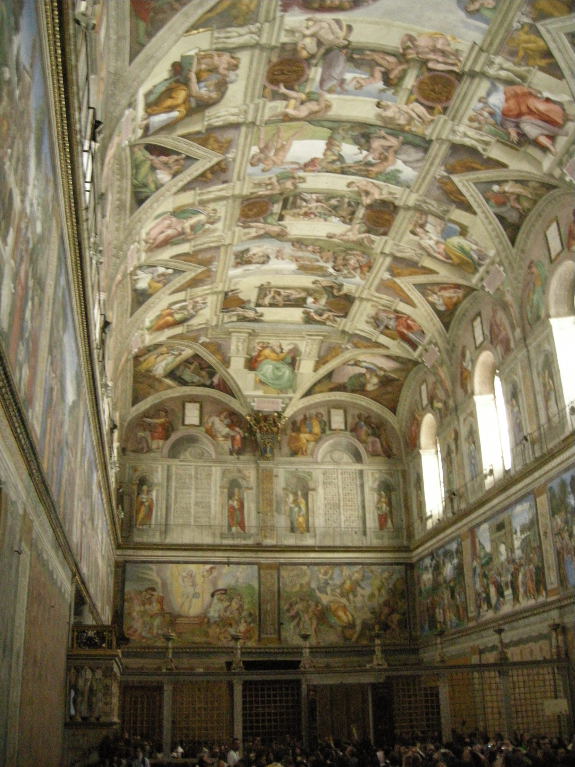 Musei vaticani, cappella sistina, retro